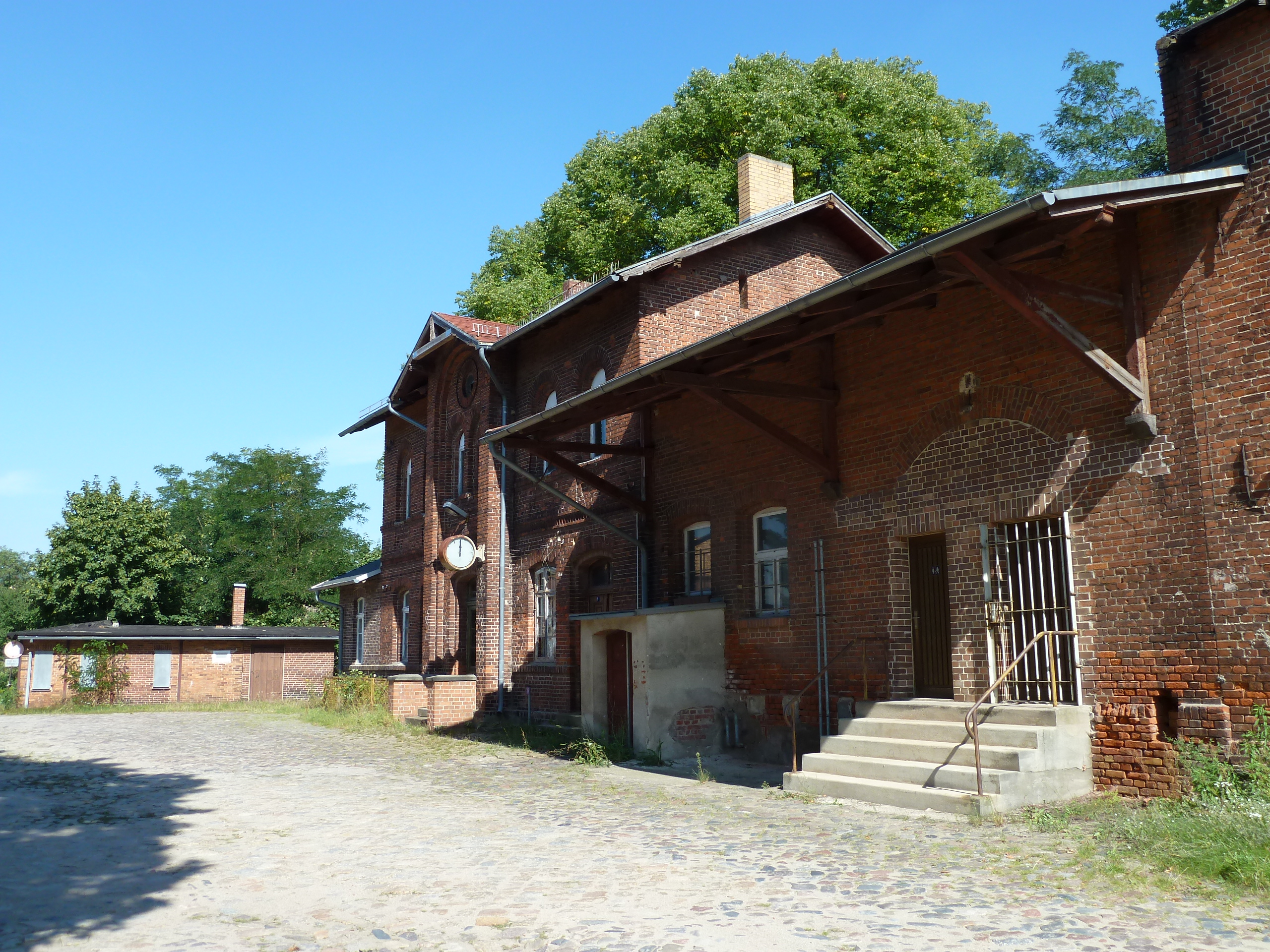 ehemaliger Bahnhof Weichensdorf, Empfangsgebäude